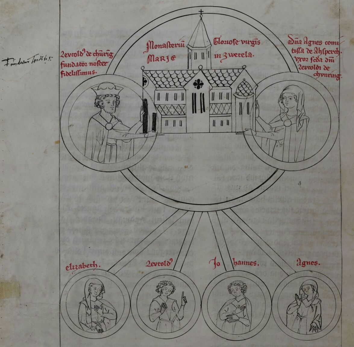 Leutold I. von Kuenring-Dürnstein mit seiner Familie auf f. 64v der Bärenhaut